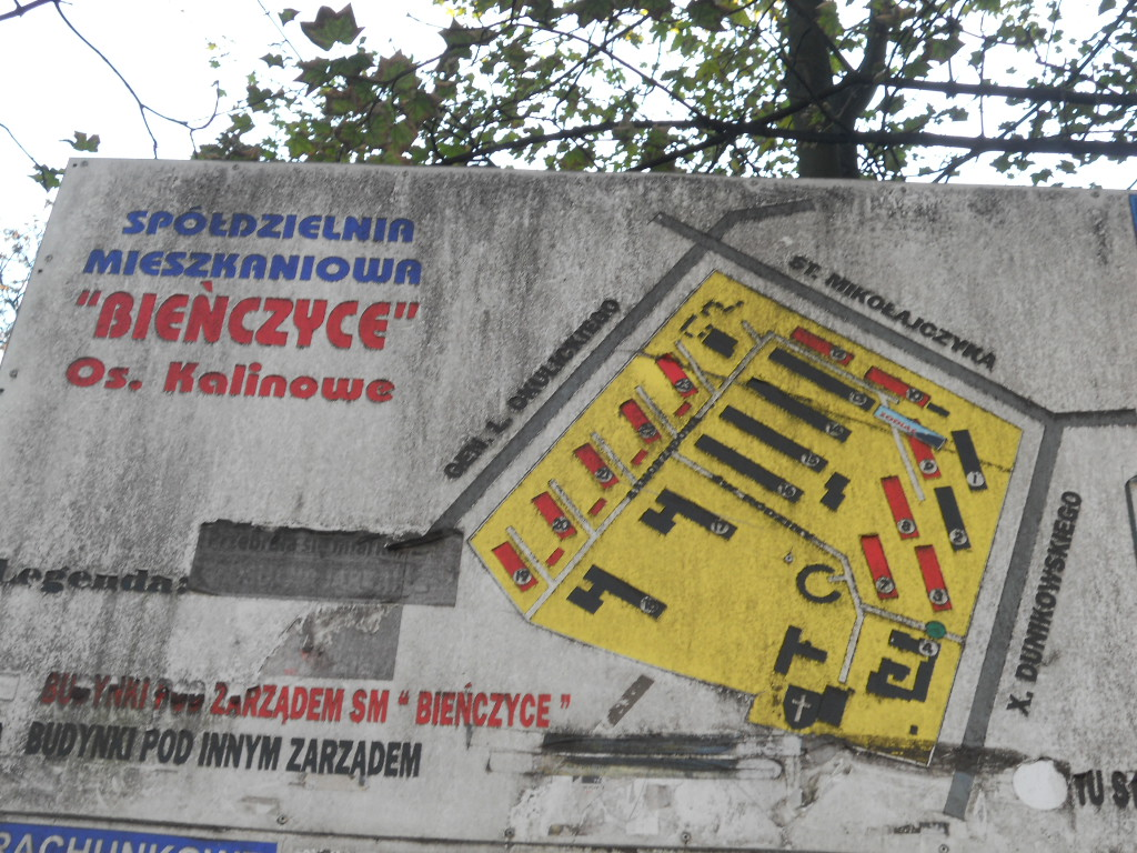 Plan Osiedla Kalinowego przy ul. Świętej Rodziny w Krakowie.